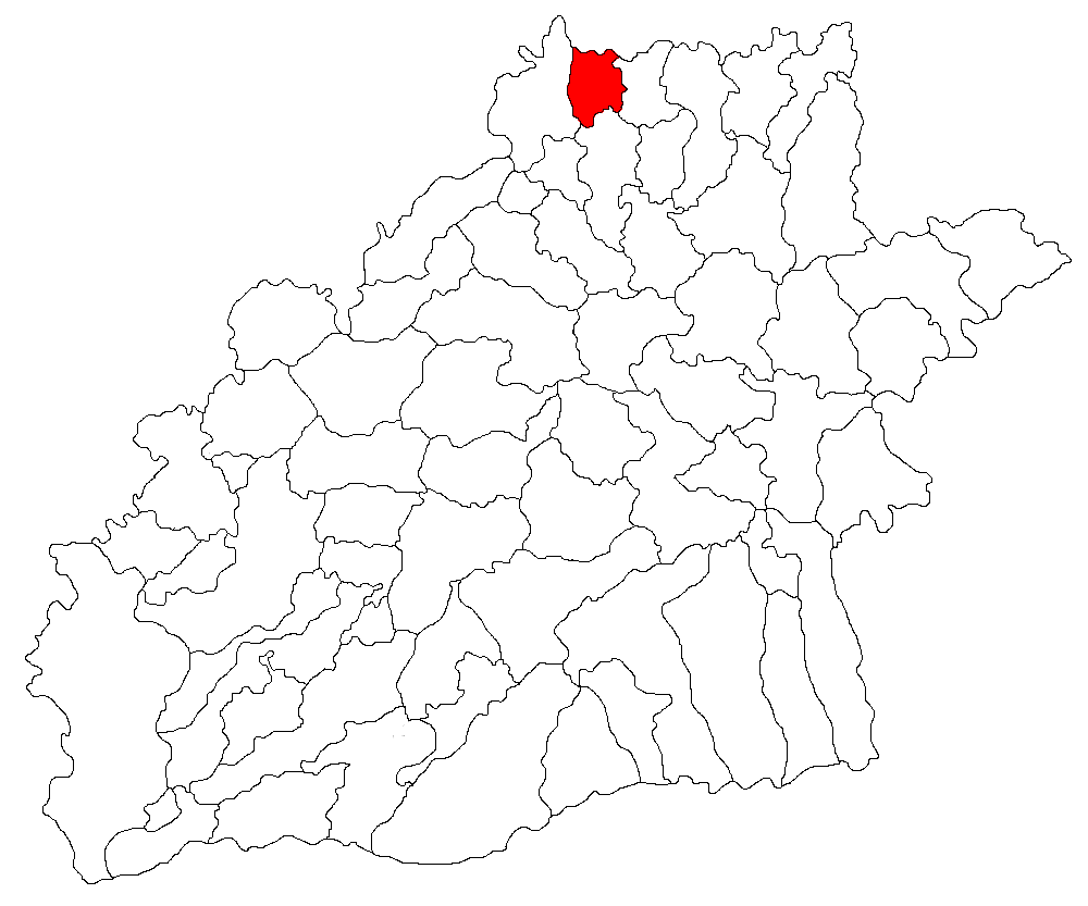 Categorie:Hărţi ale judeţului Sibiu